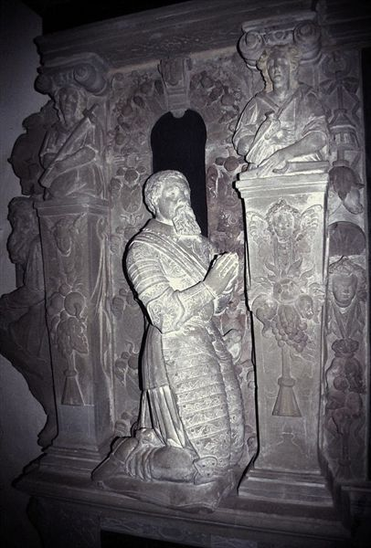 Nørup Kirke i Danmark. Epitafium For Knud Brahe og Margrethe Lange